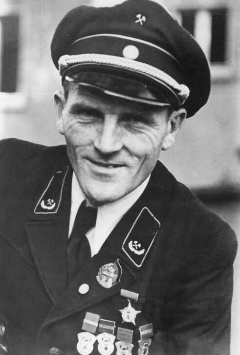 Erich Giebner Zentralbild Höhne-Pohl 1Mot. 16.10.1954 Kandidat für die Wahl zur Volkskammer am 17.10.1954. Erich Giebner "Held der Arbeit" Bergmann, Dresden (Bezirk Dresden) [Porträt Erich Giebner in Bergmannskittel mit Orden] Abgebildete Personen: Giebner, Erich: Bergmann bei der Wismut A.G., DDR